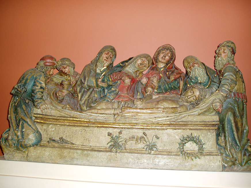 Llanto sobre Cristo Muerto. Obra de Pedro Millán de finales del siglo XV en barro cocido y policromado. Museo de BBAA de Sevilla.